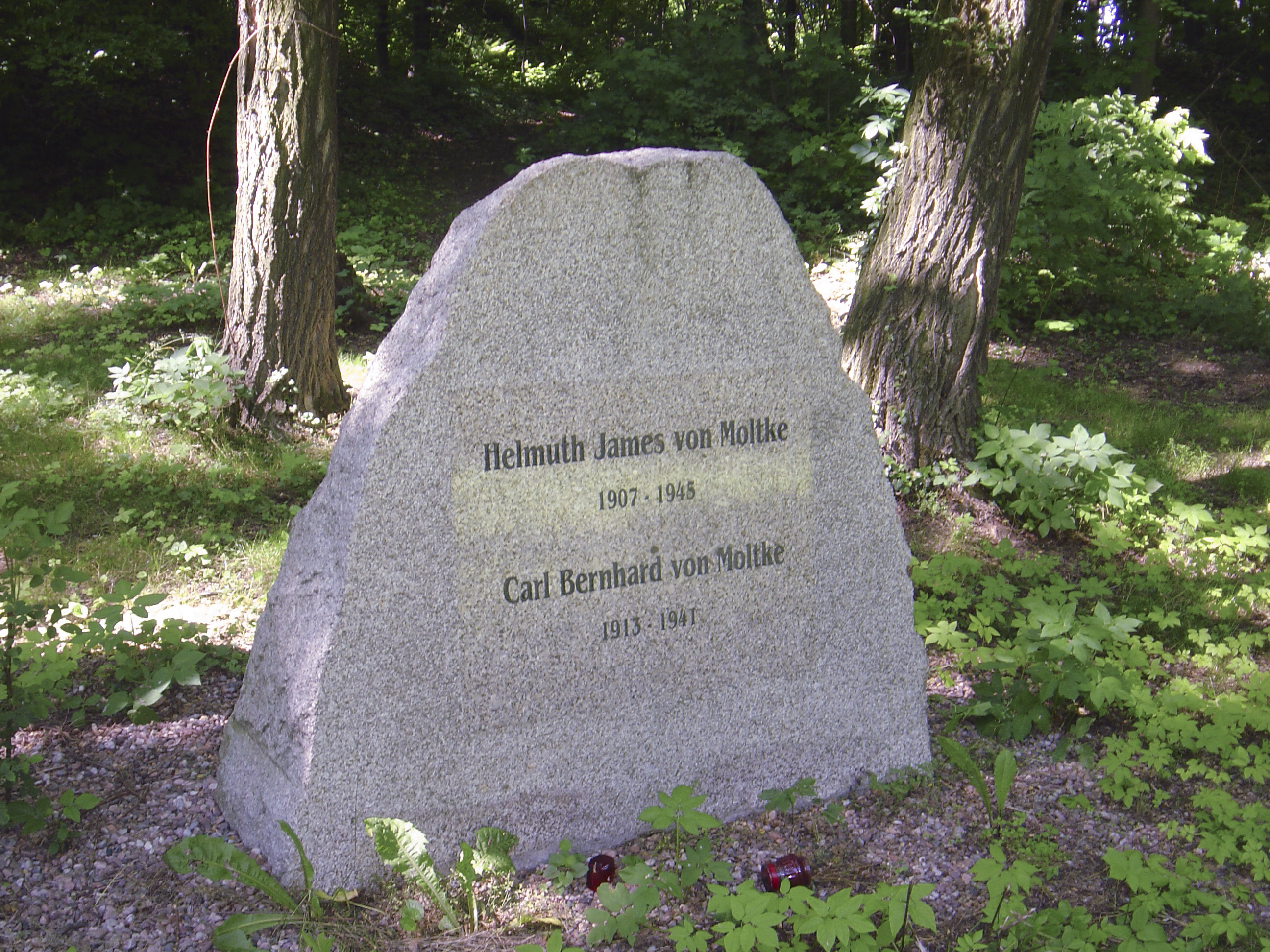 Gedenkstein für Helmuth James Graf von Moltke und seinen Bruder auf dem Kreisauer Kapellenberg.